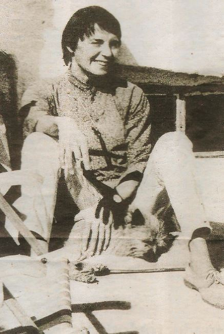 Judith KAROLYI avec son chien